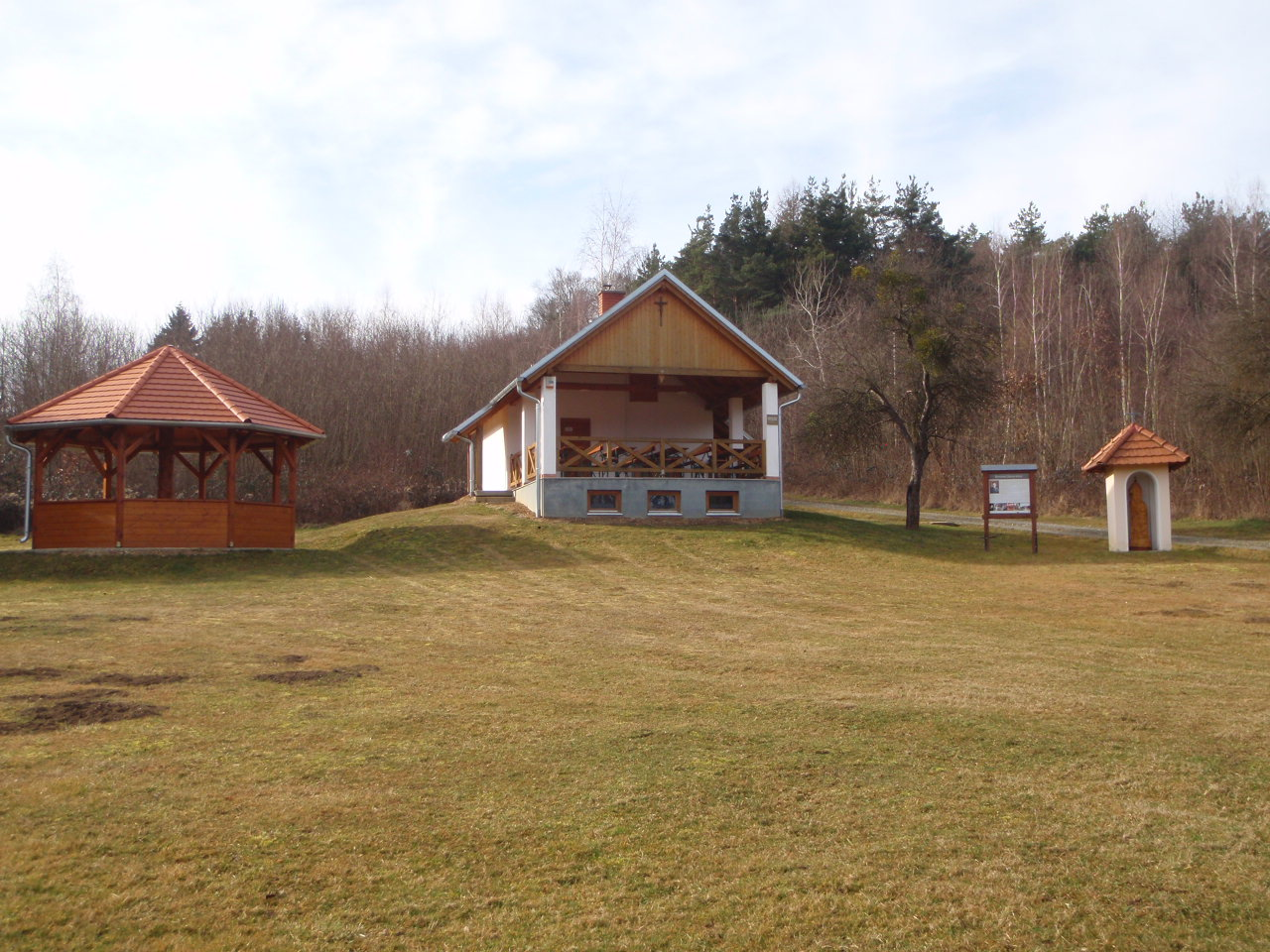 Magyarlak Szőlőhegy, Brenner János turistaház